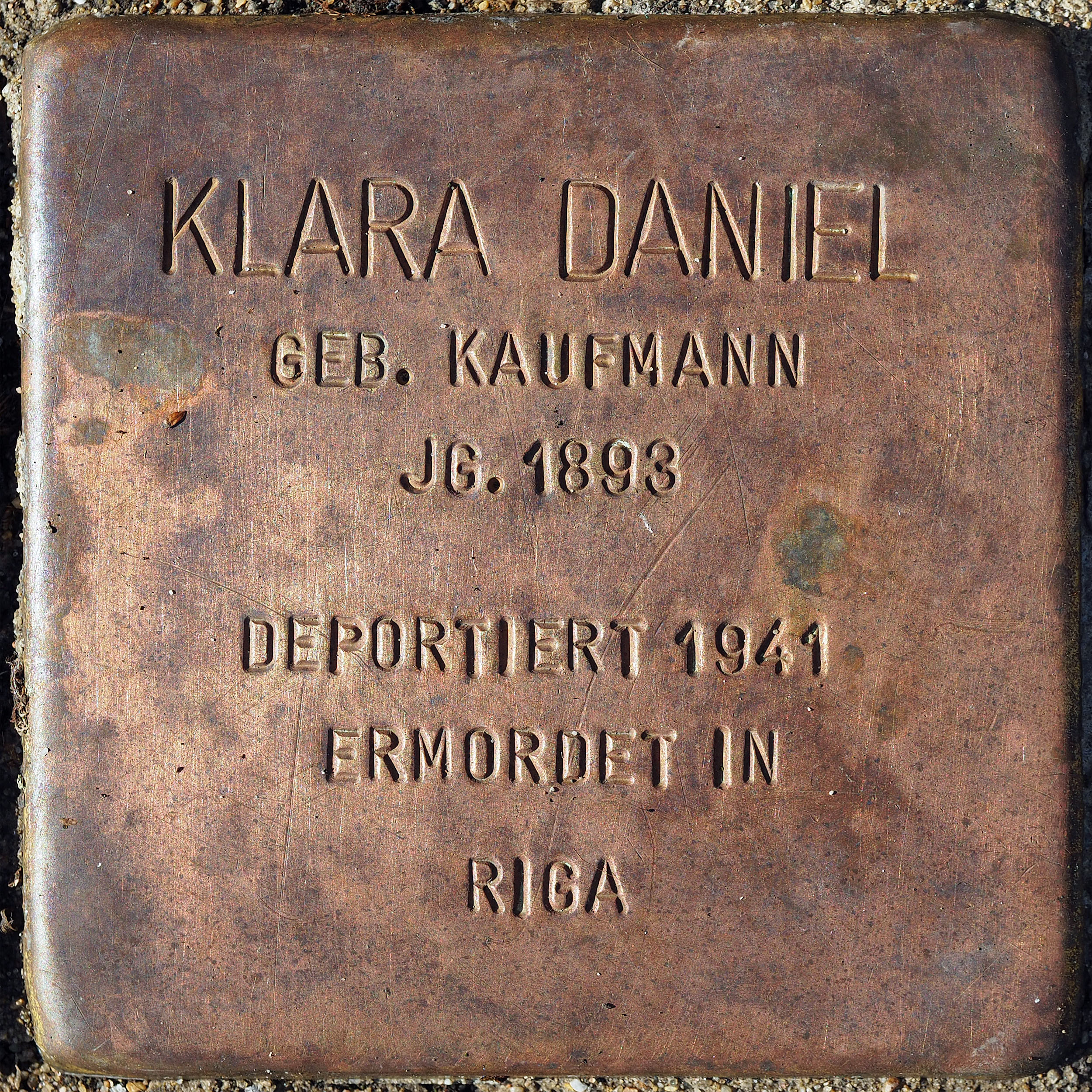 Stolperstein DU: Daniel, Klara